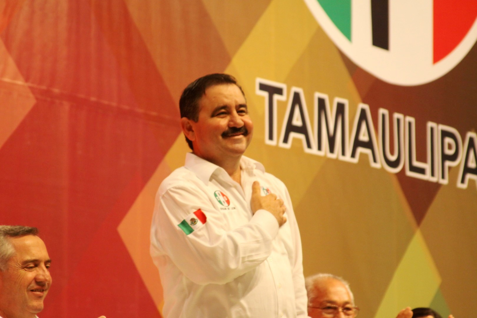 CNOP Tamaulipas 2014